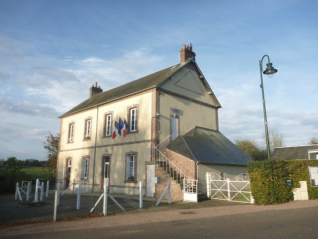 mairie